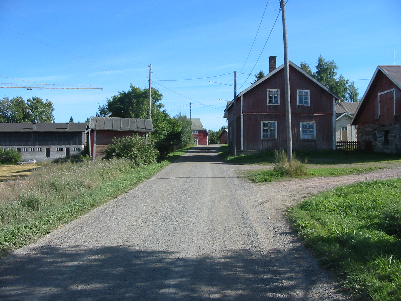 Hiirijärven kylänraittia Harjavallassa